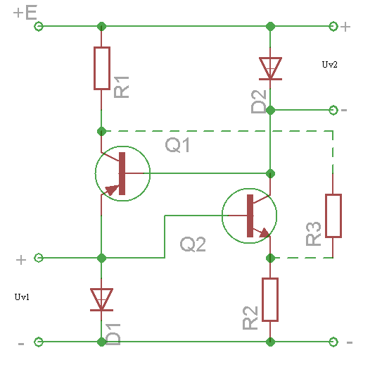 Kahe vastandpolaarse tugipinge Uv1, Uv2 allikas